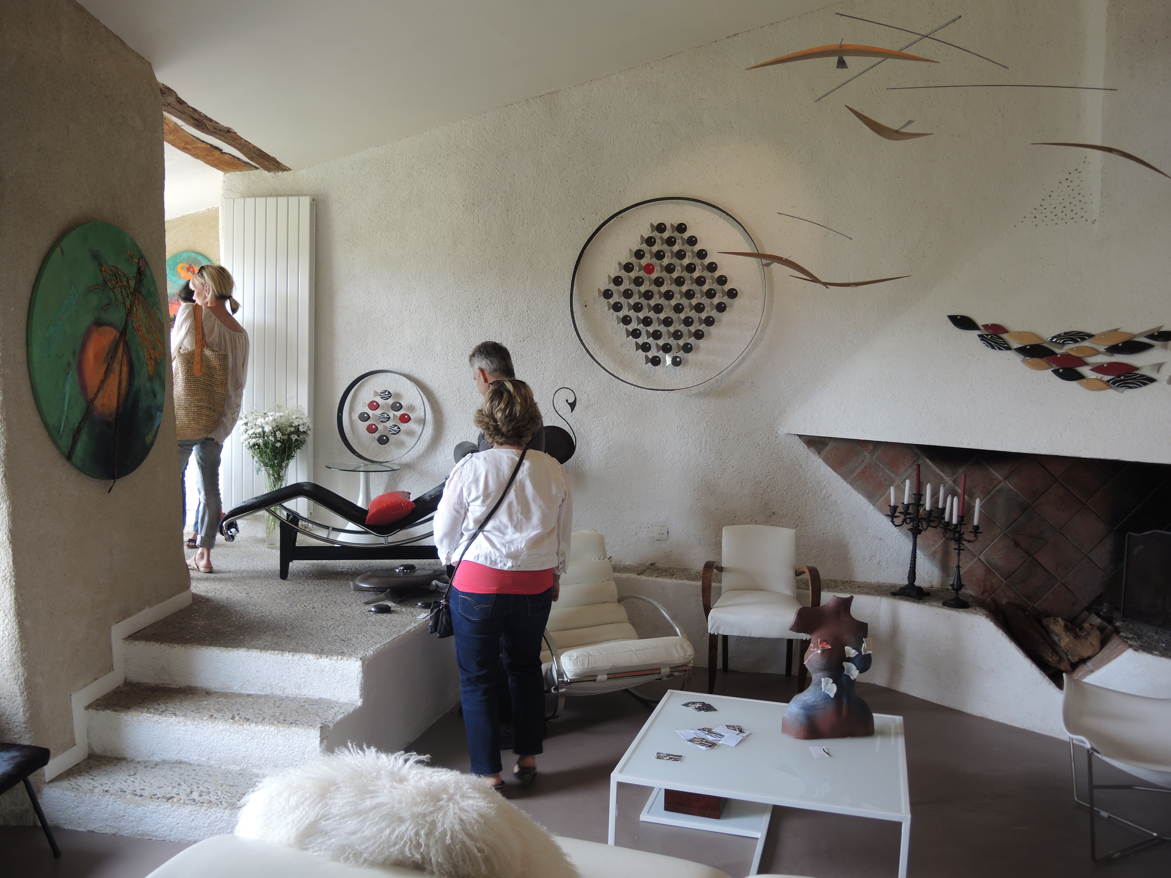 Vinzieux détail